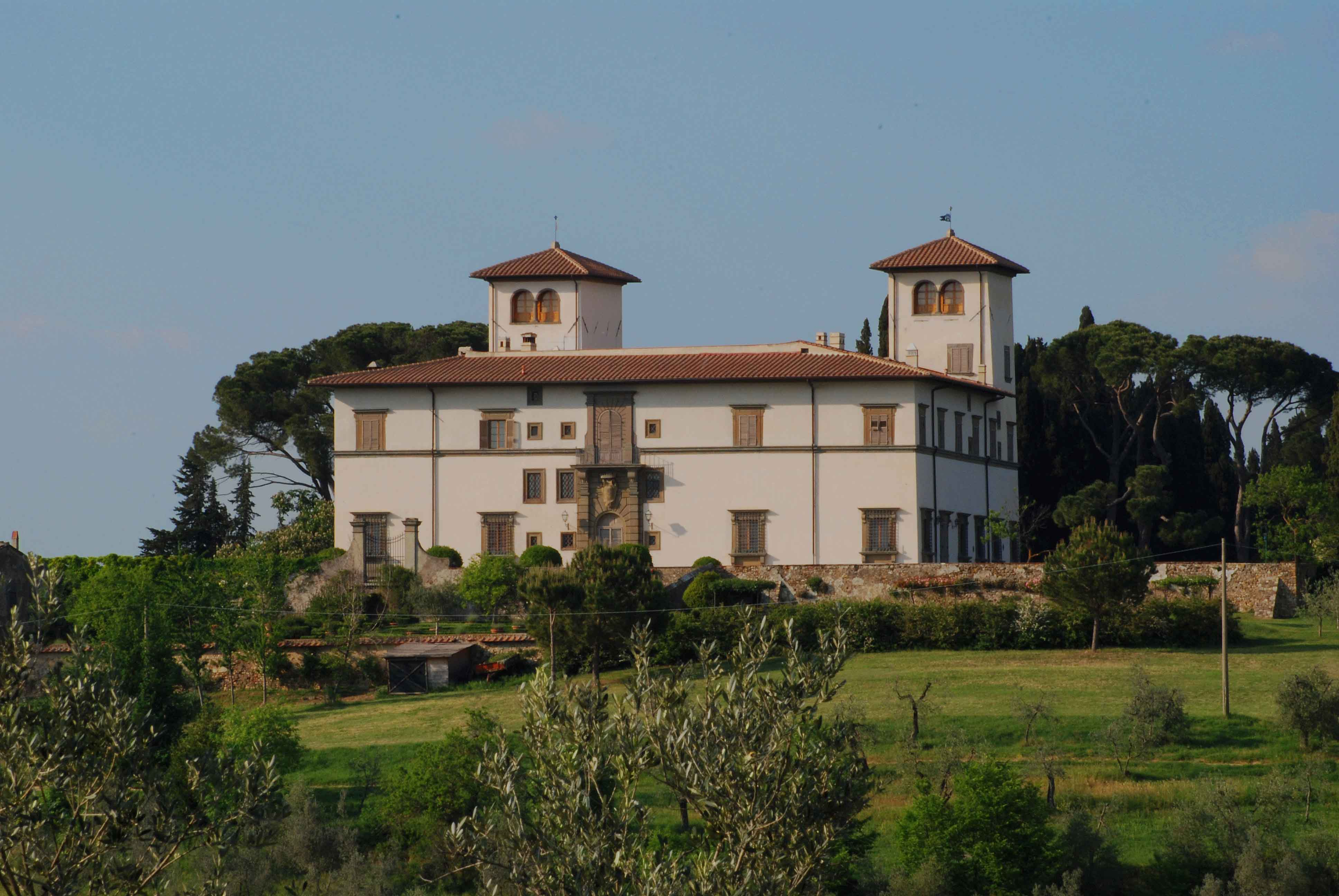 San Casciano Val di Pesa,parte posteriore di Villa Le Corti